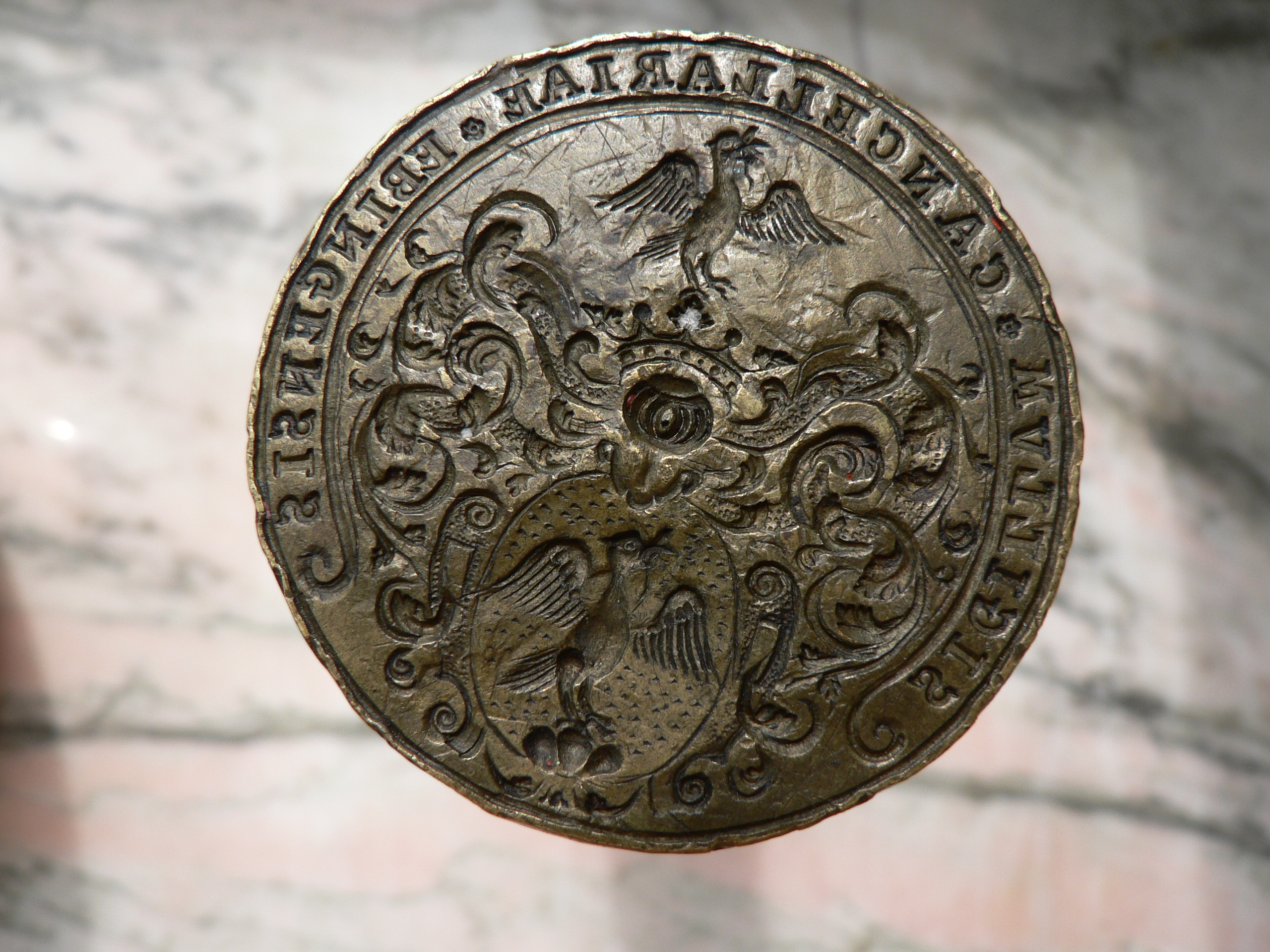 Petschaft der Familie Ebinger von der Burg (Kanzleisiegel), 18. Jhd., Privatbesitz